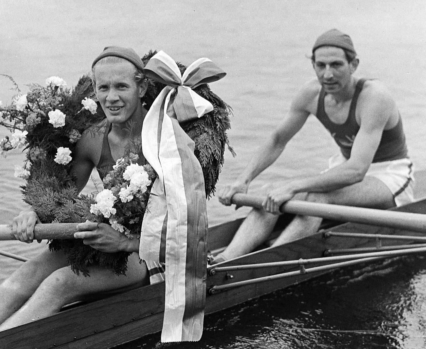 Europees Roeikamp Bosbaan, de Zweden Evert Gunnarson en Bernt Torberntsson, kampioen twee zonder stuurman in 1949.